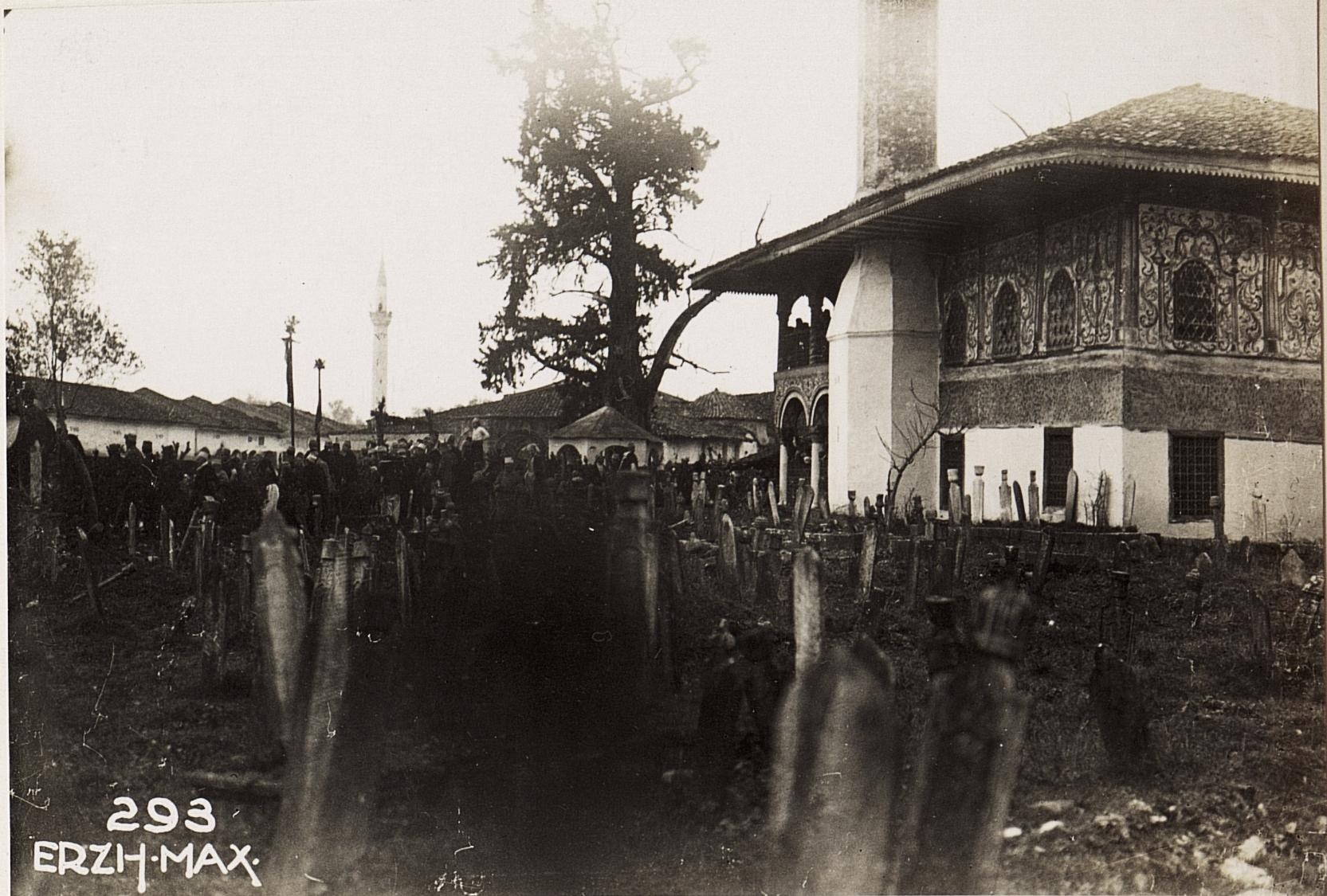 Türkischer Friedhof, Tirana.